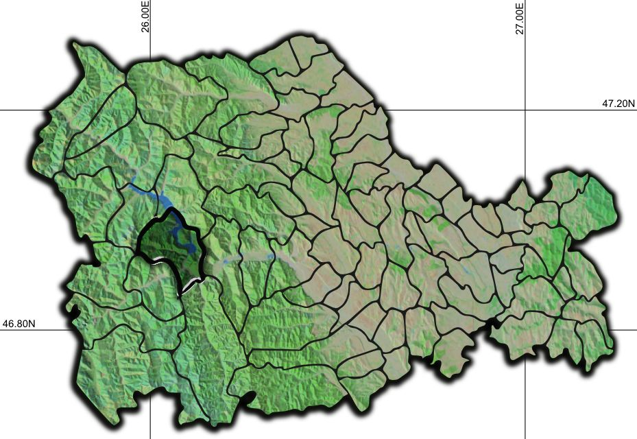 Bicaz jud Neamt.